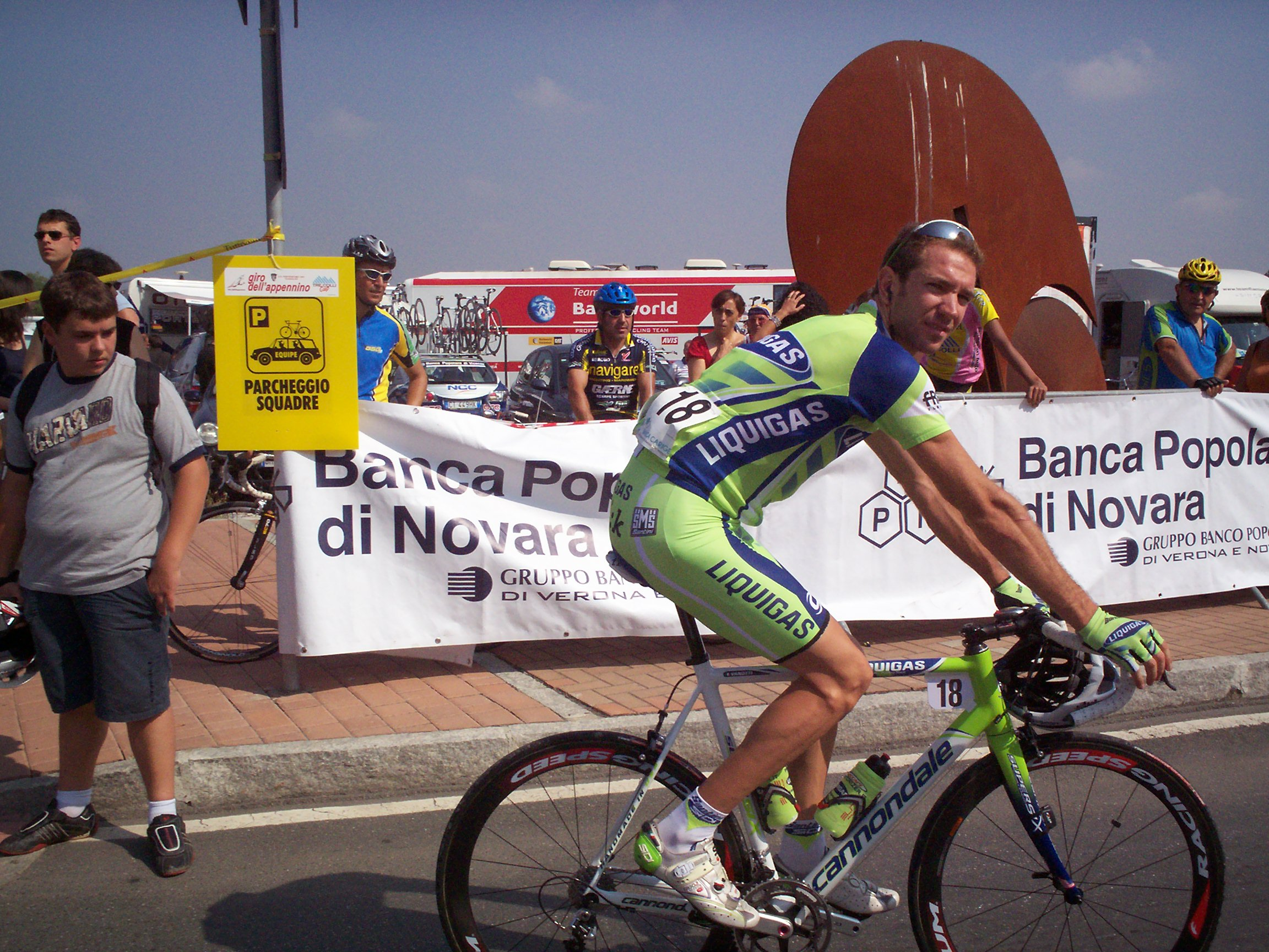 alessandro vanotti giro appennino